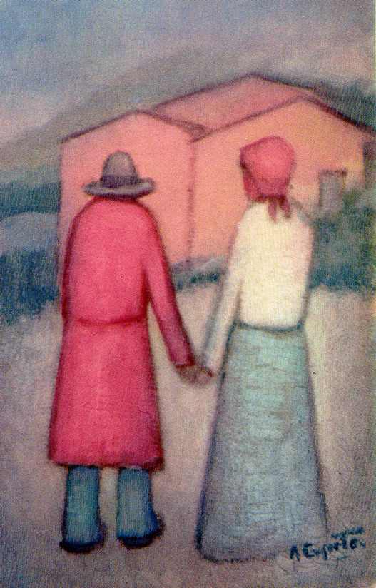 opera pittorica realizzata da Angelo Caputo negli anni ottanta durante il suo periodo neofigurativo